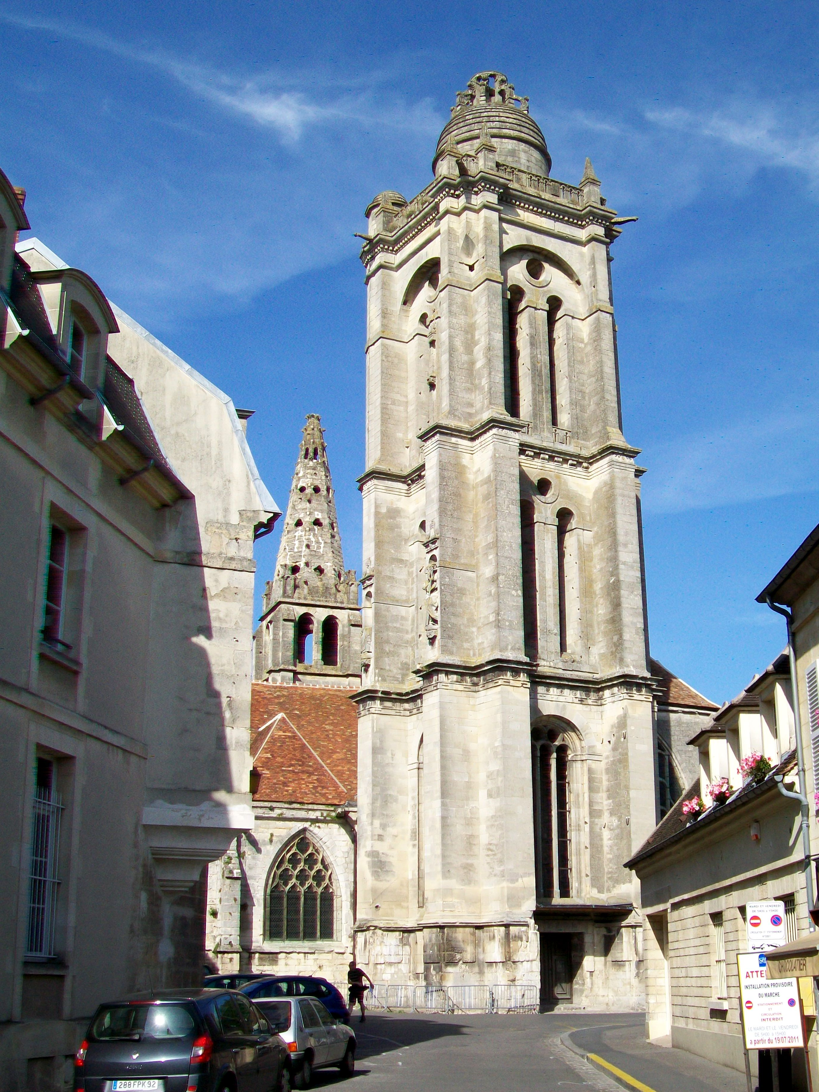 Les deux clochers de Saint-Pierre.